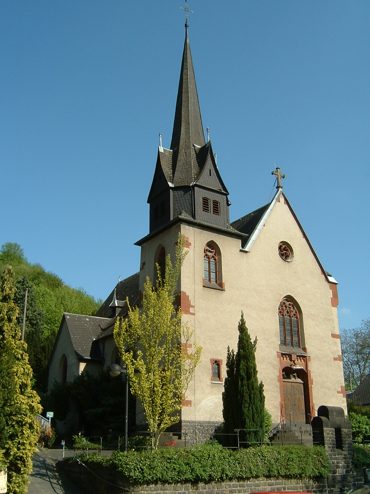 Katholische Filialkirche St. Michael im Ortsteil Kasbach von Kasbach-Ohlenberg